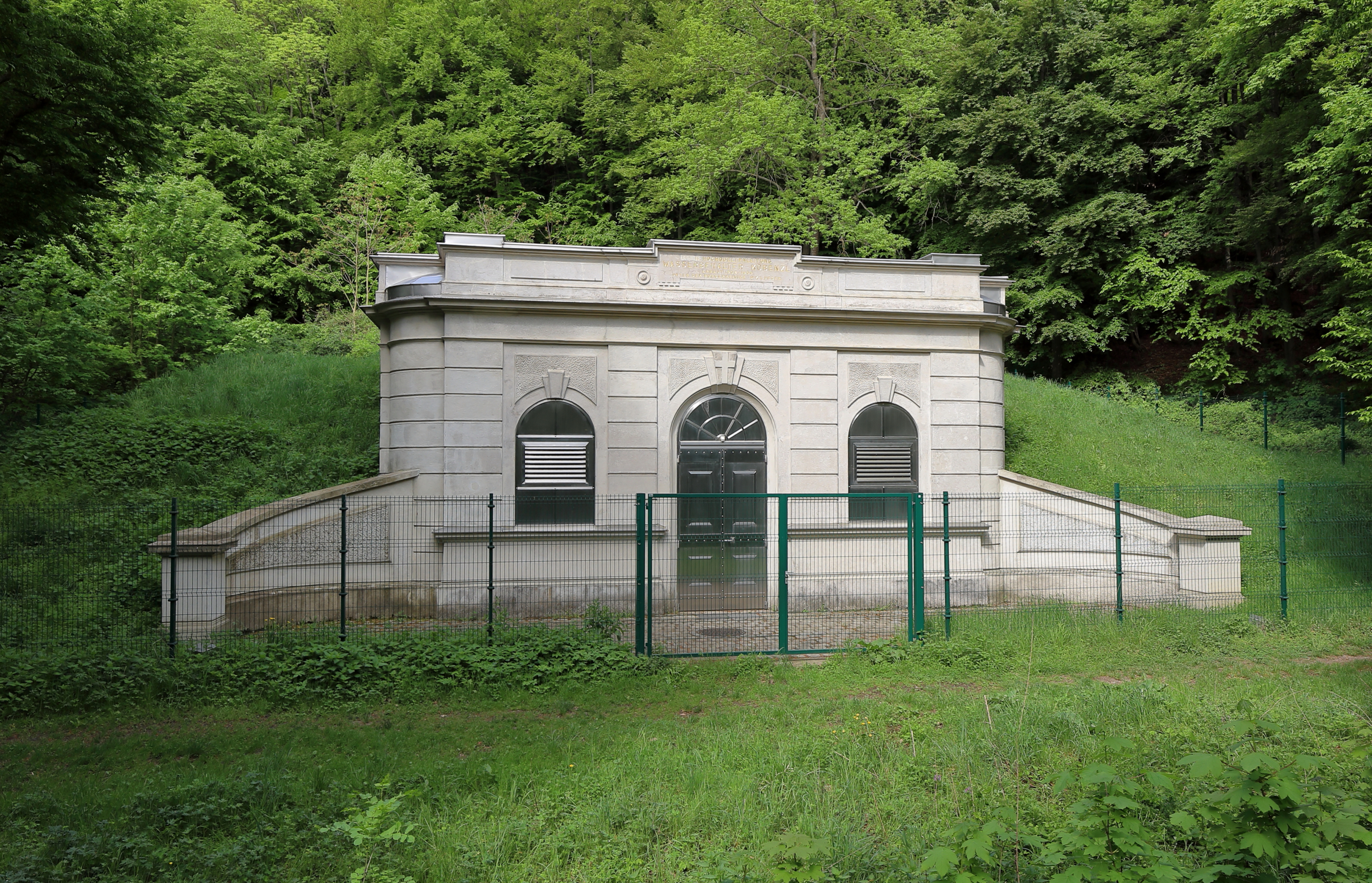 Der Wasserbehälter Cobenzl am östlichen Abhang des Latisberges im 19. Wiener Gemeindebezirk Döbling.Der Wasserbehälter wurde zwischen 1908 und 1909 als Hochbehälter der 2. Wiener Hochquellenleitung nach Plänen des Wiener Stadtbauamtes im späthistorisch-neobarocken Stil errichtet. Im Jahr 2006 wurde das Behältervolumen von 760 Kubikmetern auf 1.500 Kubikmeter vergrößert.